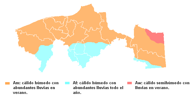 Mapa de Climas de Tabasco / Climate map of Tabasco